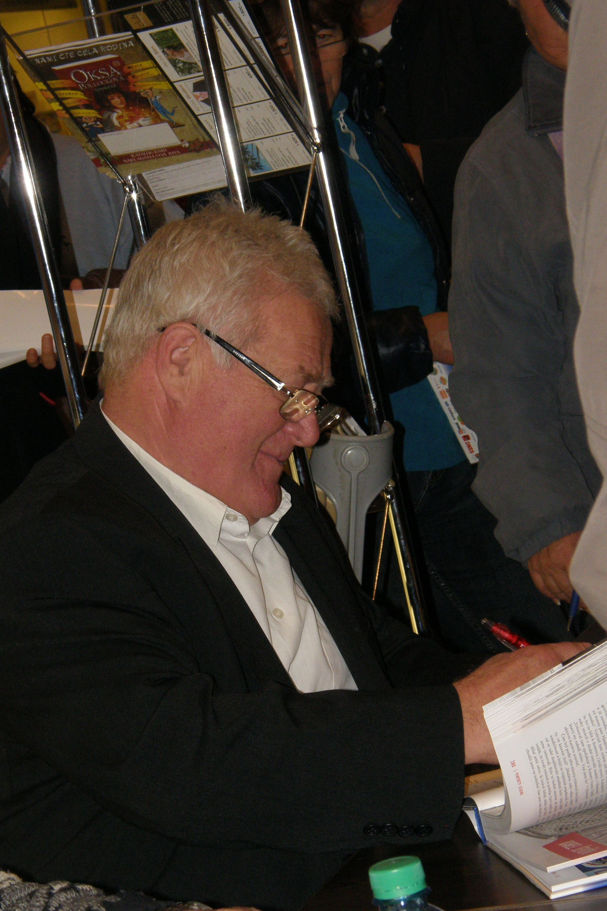 František Ševčík na autogramiádě v brněnské Vaňkovce k příležitosti vydání knihy Kometa - příběh hokejového klubu